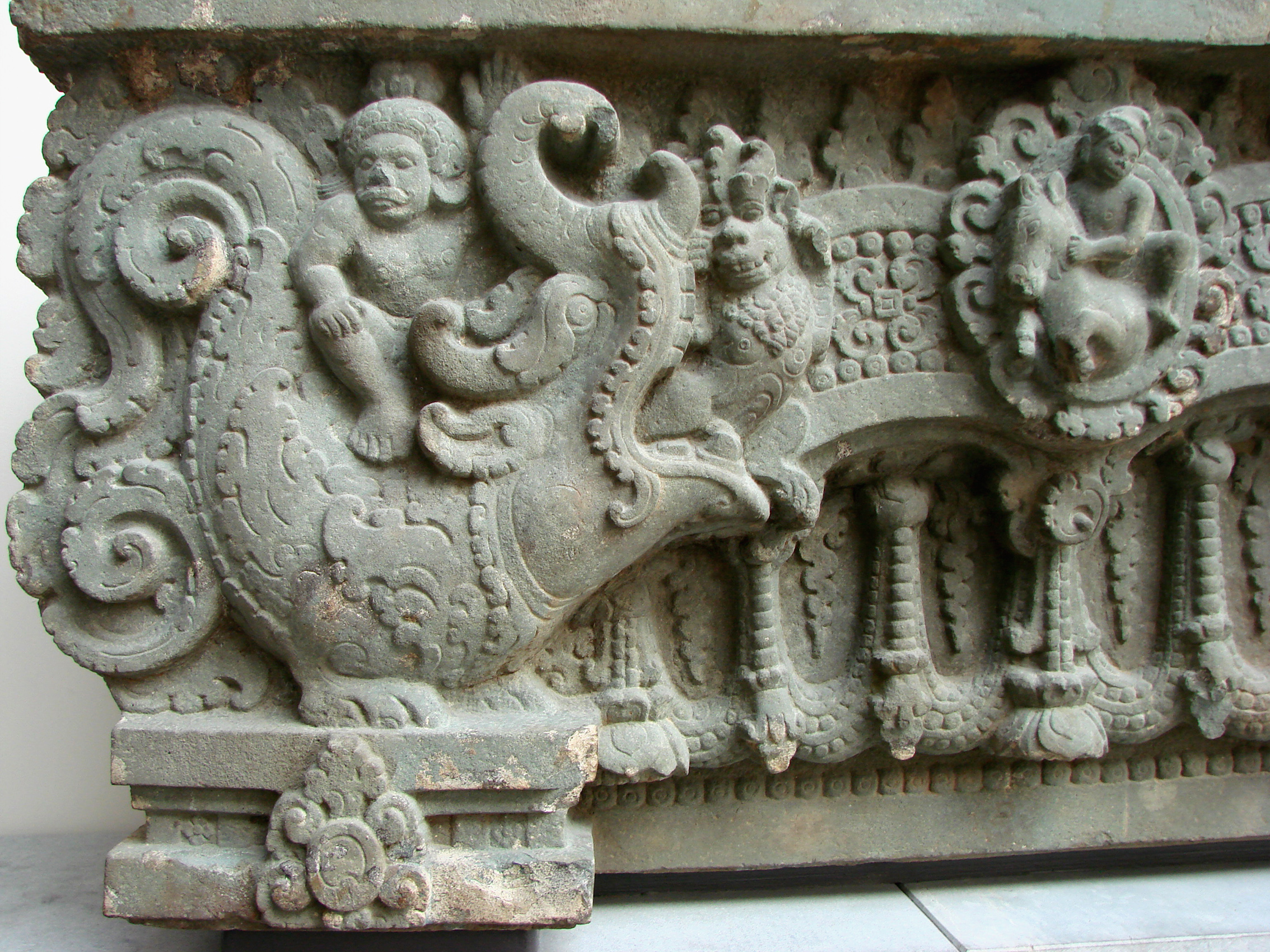 Linteau. Provenance: Cambodge, province de Kompong Thom, Sambor Prei Kuk S7. Style de Sambor Prei Kuk. 1ère moitié du 7ème siècle.Détail montrant le bord du linteau et un Marut, dieu de la tempête et du vent. Musée Guimet, Paris.